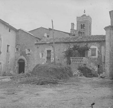 Abadia de Vilabertran amb el pati i el campanar. Frederic Bordas i Altarriba (ca. 1890)